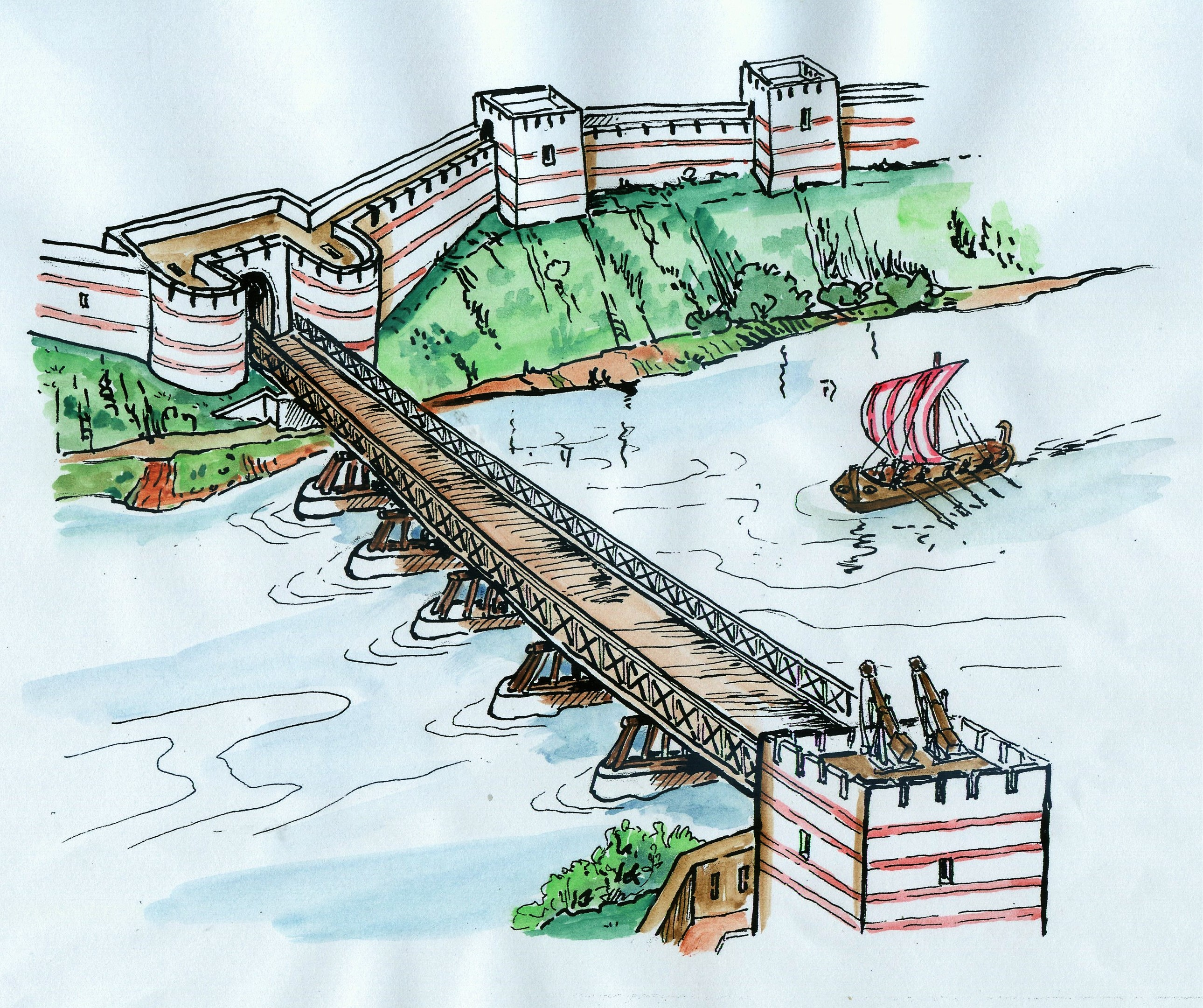 Küssaberg im Landkreis Waldshut in Baden-Württemberg. Historische Römerbrücke (1. Jh. n. Chr.) zwischen dem heutigen Bad Zurzach (Tenedo) und Rheinheim. Zeichnung von Wolf Pabst.